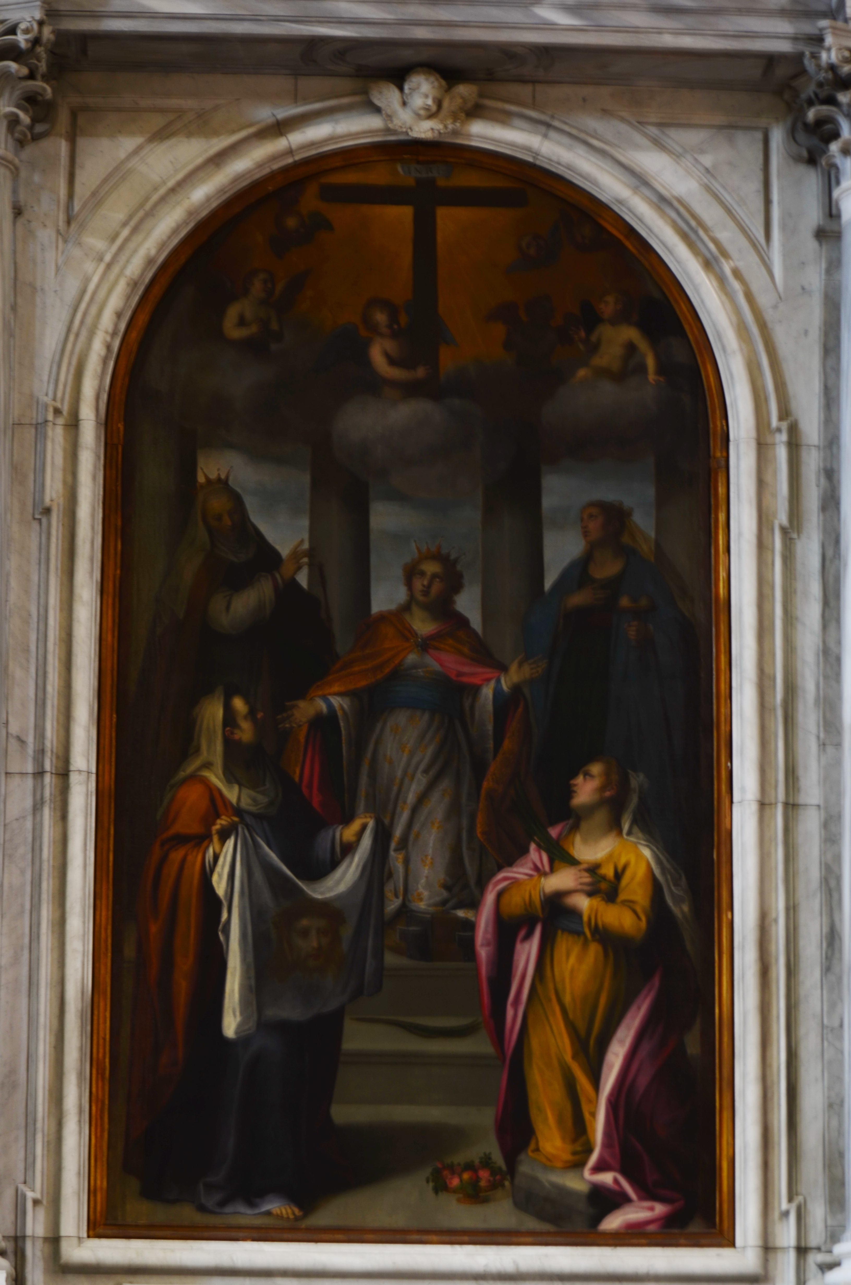 Duomo di Cividale Pala con cinque sante che adorano la croce